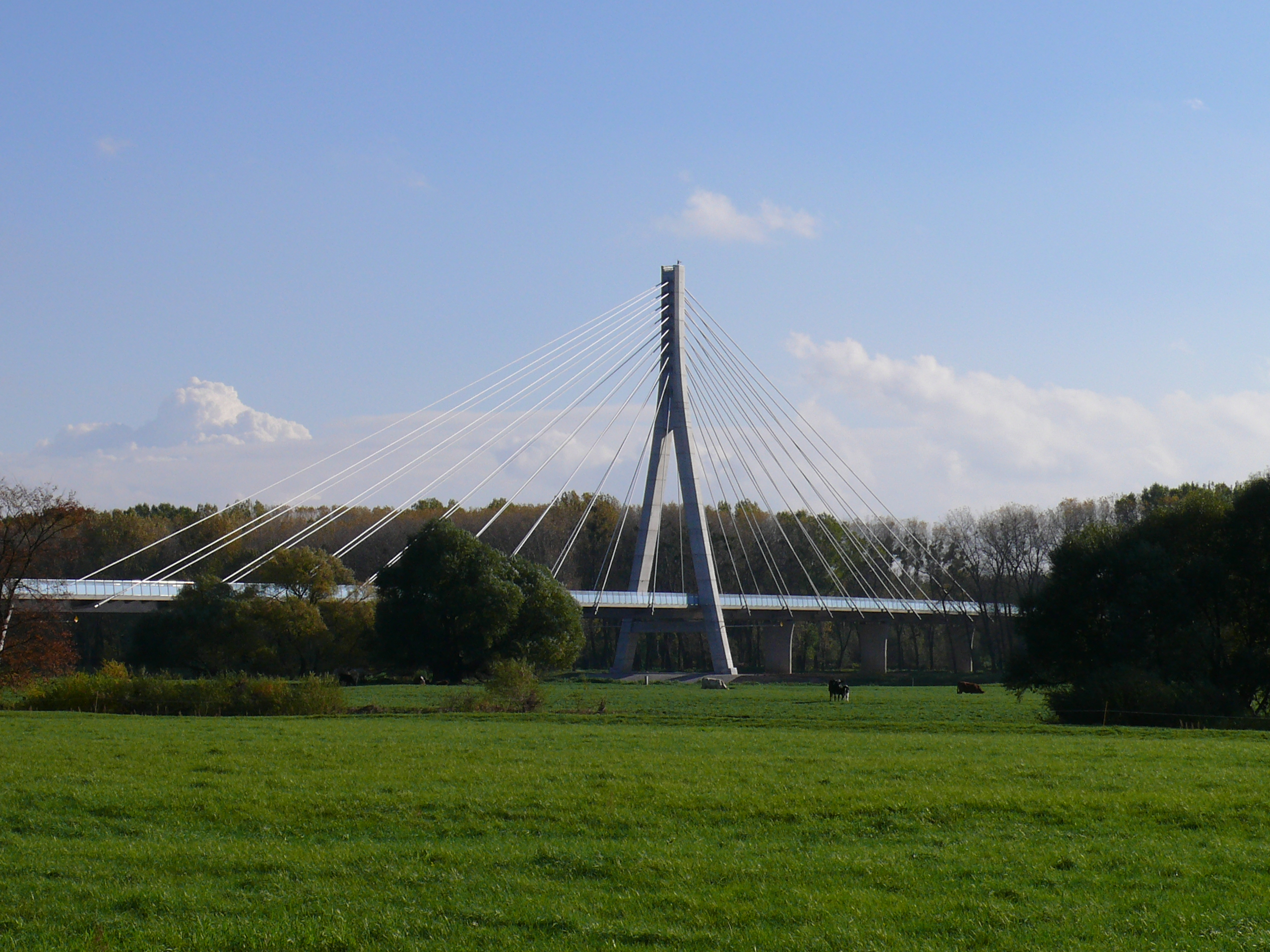 Structural Award 2014. Die Elbauenbrücke (Baubeginn 2010) ist eine Pylonbrücke mit je einer Vorlandbrücke auf jeder Seite. Länge: 1.128,50 Meter Breite: 11,6 Meter. Der Pylon ist gut 73 Meter hoch. Das Bauwerk wurde Ende August 2013 für den Verkehr frei gegeben.